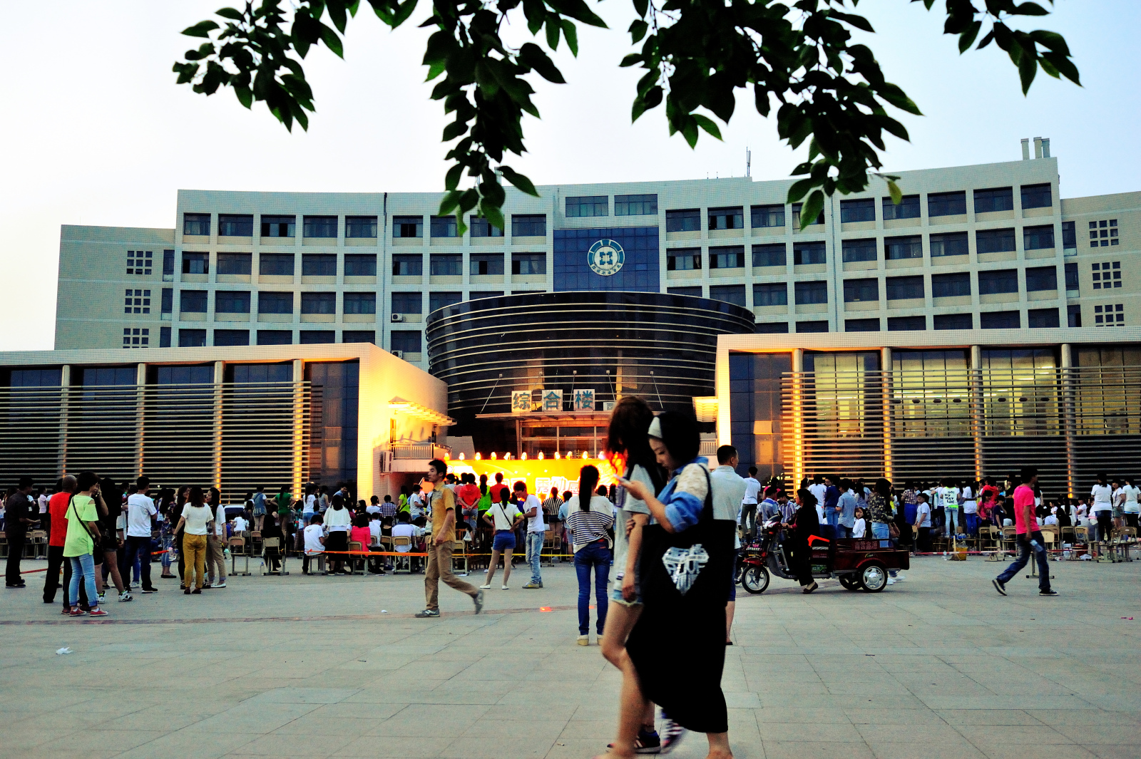 西校园综合楼